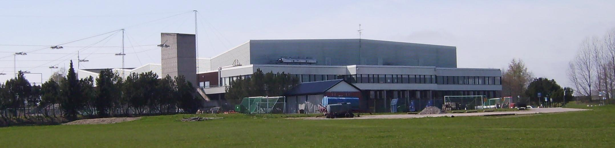 The ice hockey rink “Himmelstalundshallen” in Himmelstalund, Norrköping, Sverige.